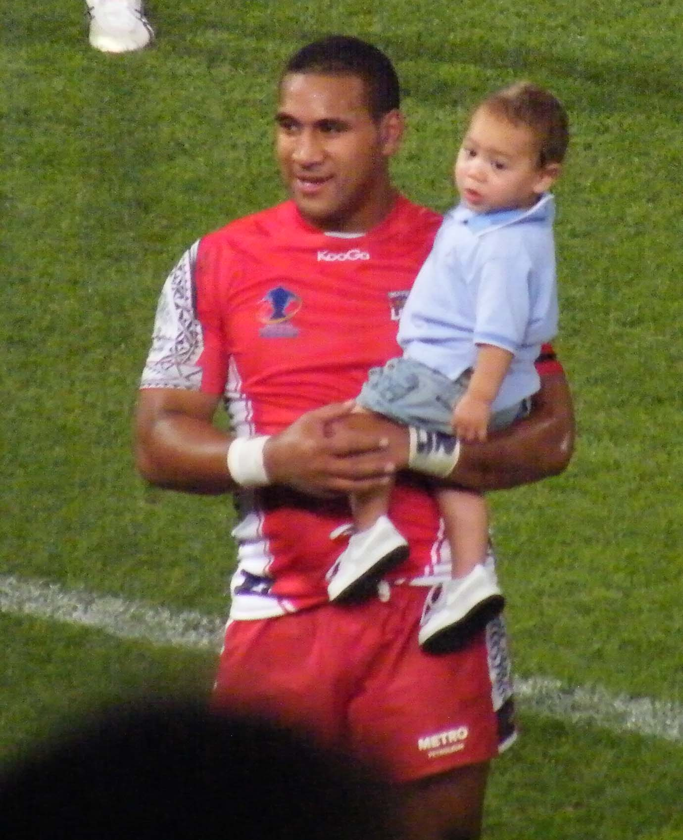 Tonga Winger Cooper Vuna. RLWC - Ireland v Tonga, Parramatta Stadium 2008.